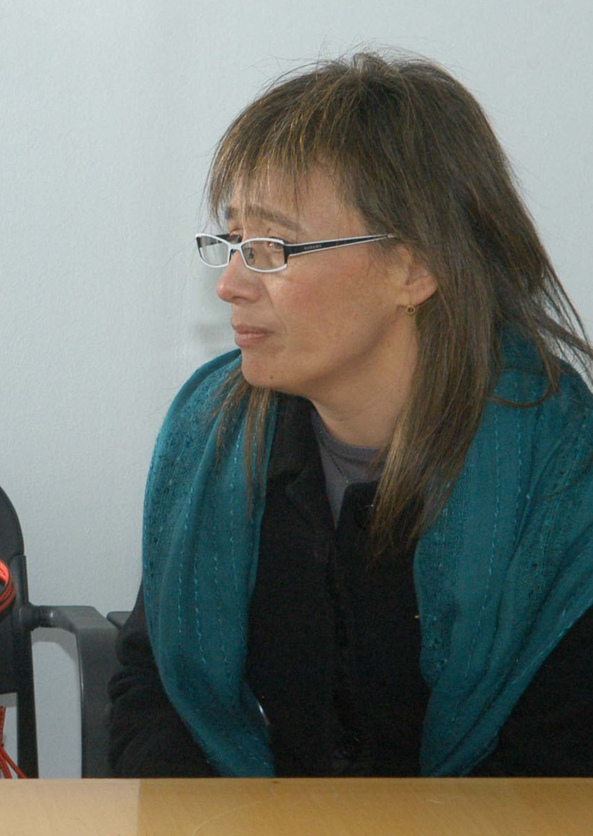 Fabiana Ríos, la gobernadora electa de la provincia argentina de Tierra del Fuego, Antártida, e islas del Atlántico Sur